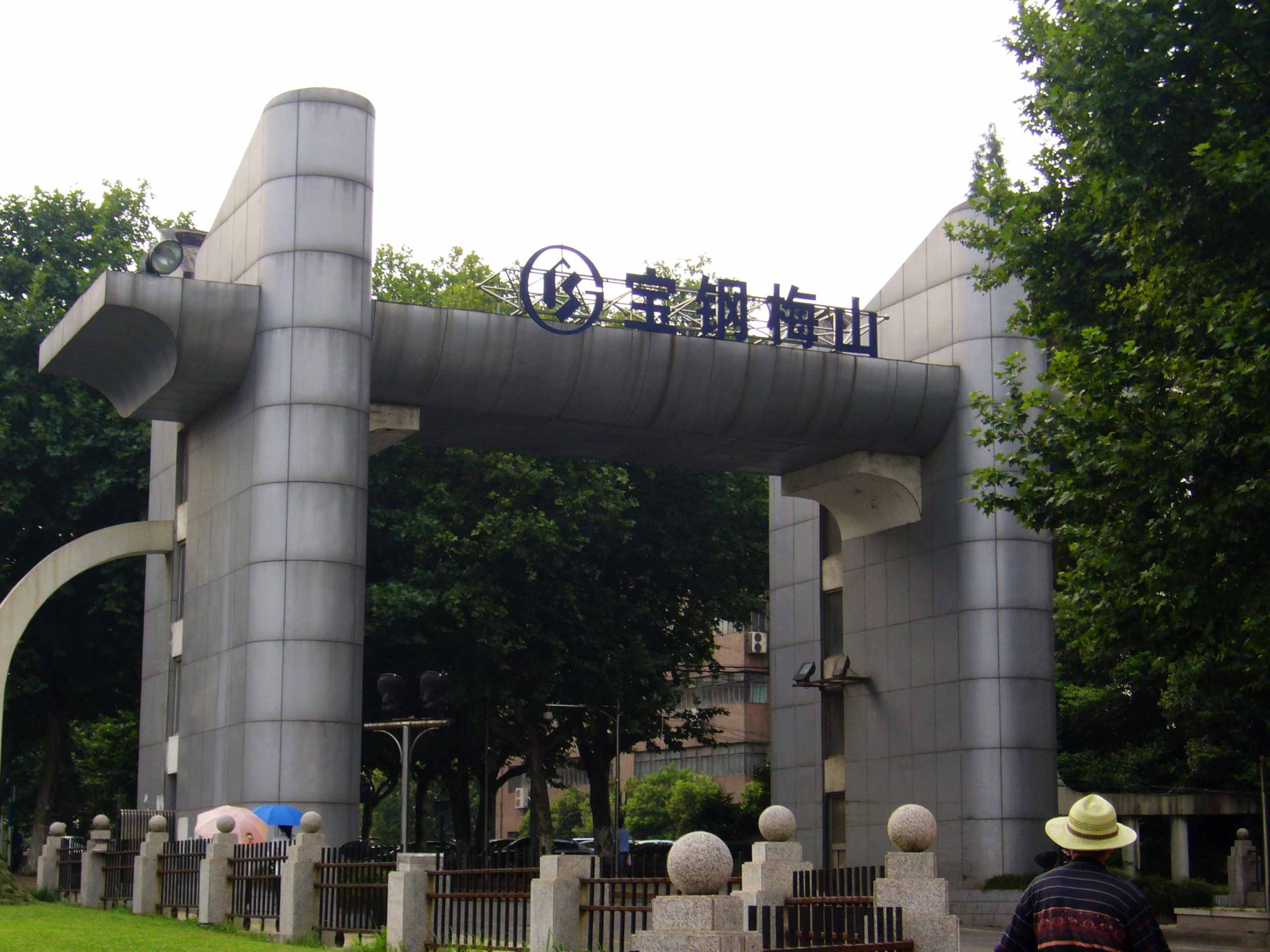 上海宝钢南京梅山公司